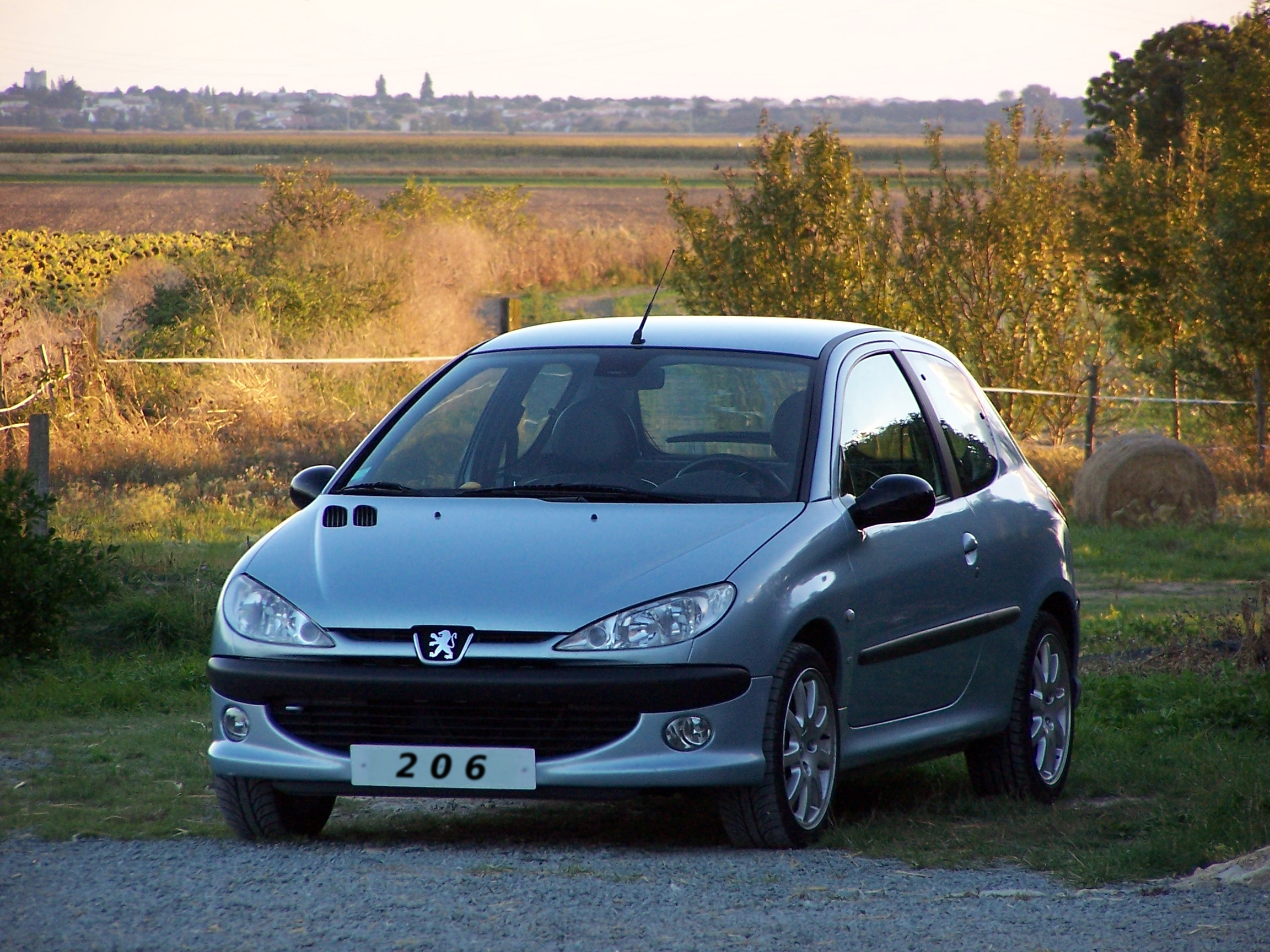 Photographie d'une Peugeot 206 S16. Héritière de la fameuse 205 GTI, la Peugeot 206 S16 (également connue sous le nom de 206 GTI sur certains marchés), est équipée d'un moteur 1 997 cm³ de 137 ch. Une série limitée, appelée 206 GT, produite à 4 000 exemplaires, en a été dérivée afin d'obtenir une homologation en WRC. Elle se distingue par ses pare-chocs plus importants, la 206 n'étant pas assez longue à l'origine pour pouvoir prétendre à la catégorie WRC. À l'origine, des options telles que la peinture gris iceland ou les optiques de phares transparents lui étaient exclusivement réservées, tout comme les jantes 'foudres' de 15 pouces, les rétroviseurs laqués noirs, puis Peugeot les a progressivement étendues à l'ensemble de la gamme 206. Depuis 2002, la 206 RC est venue rejoindre la S16 au sommet de la gamme 206.